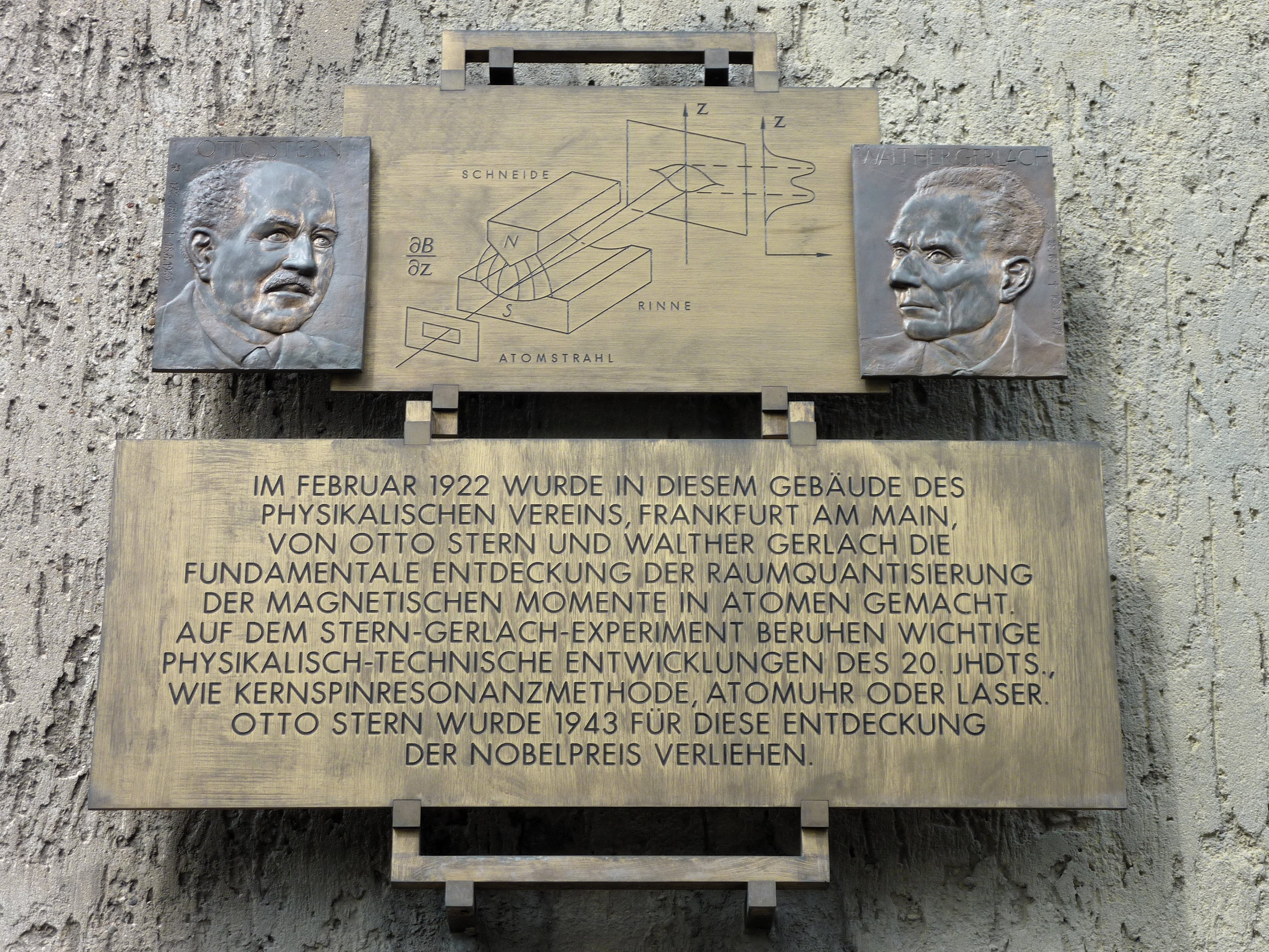 Gedenktafel an der Fassade des Gebäudes des Physikalischen Vereins in Frankfurt am Main, an das Werk der Physiker Otto Stern und Walther Gerlach erinnernd. Inschrift: „Im Februar 1922 wurde in diesem Gebäude des Physikalischen Vereins, Frankfurt am Main, von Otto Stern und Walter Gerlach die fundamentale Entdeckung der Raumquantisierung der magnetischen Momente in Atomen gemacht. Auf dem Stern-Gerlach-Experiment beruhen wichtige physikalisch-technische Entwicklungen des 20. Jhdts., wie Kernspinresonanzmethode, Atomuhr oder Laser. Otto Stern wurde 1943 für diese Entdeckung der Nobelpreis verliehen.“